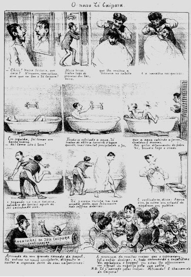 A personagem Zé Caipora, considerada a primeira História em Quadrinhos do Brasil, na Revista Illustrada de Angelo Agostini.